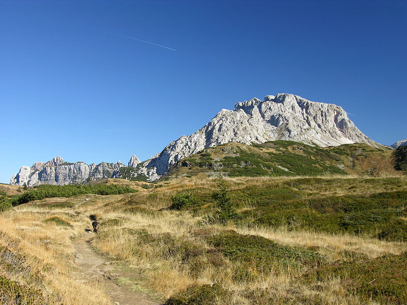 Foto tratta dalla wikipedia in lingua friulana :fur:figure:Aip.jpg